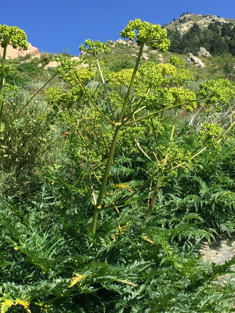 Moloposperme du Péloponnèse dans la réserve naturelle de Prats-de-Mollo-la-Preste fin juillet.